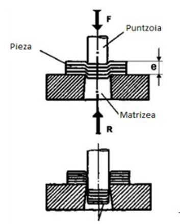 Puntzonaketa-prozesua